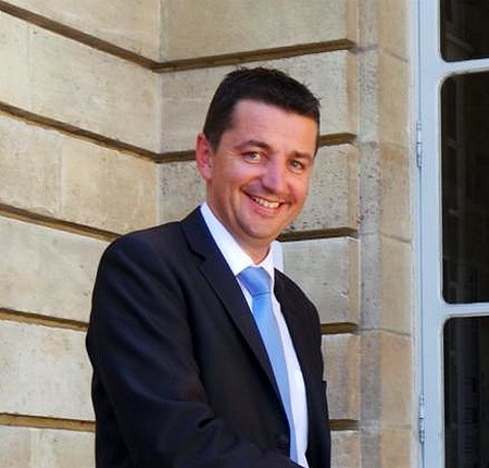 Actuel Maire de Saint-Étienne (depuis 2014). Diplômé de l'ESC Saint-Étienne.